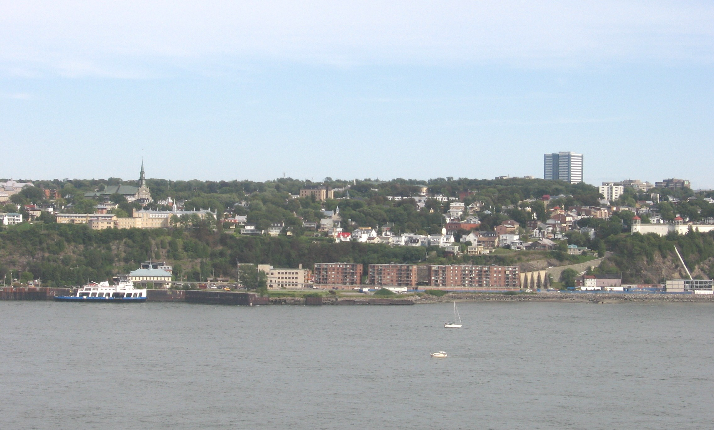 Photo de Lévis avec la nouvelle tour de Desjardins